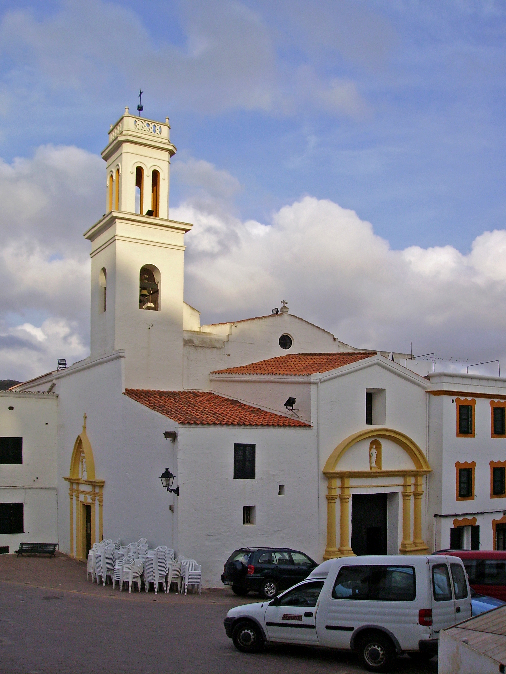 Església de Sant Bartomeu (s.XVIII), Ferreries, Menorca, Illes Balears.